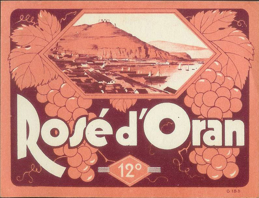 Rosé d'Oran